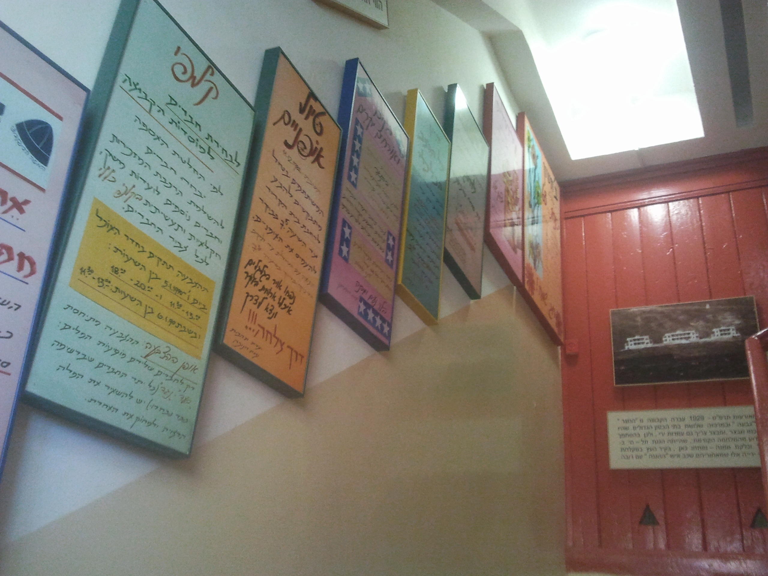 מוזיאון לתולדות כנרת נפתח בשנת 2006 במבנה במבנה בשנת 1929 פוסטרים שפורסמו במשך השנים בקבוצה בחדר המדרגות העולה מהקומה הקרקע לקומה השנייה במבנה